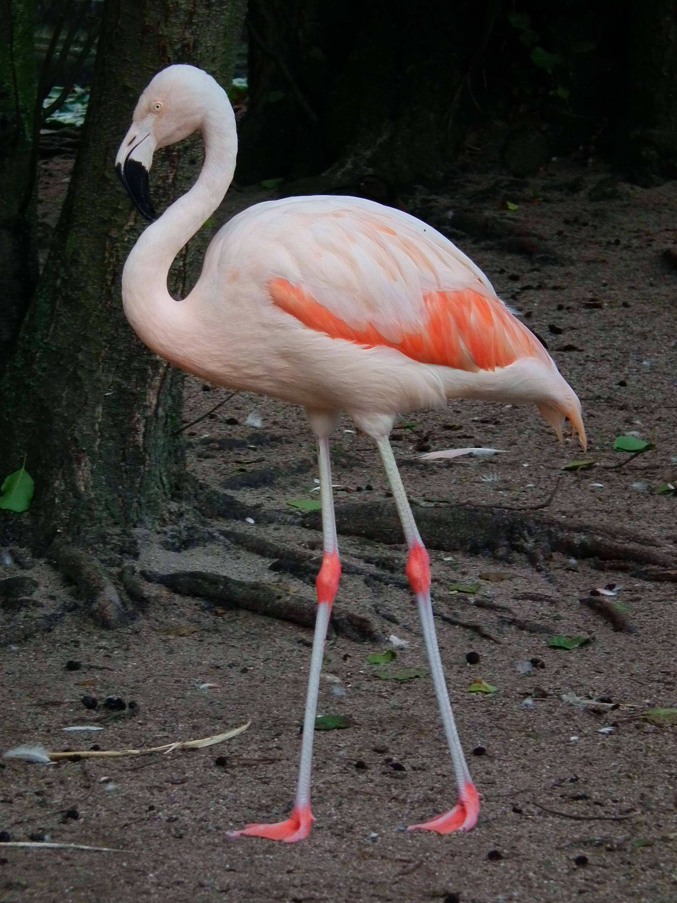 Chileflamingo (Phoenicopterus chilensis)